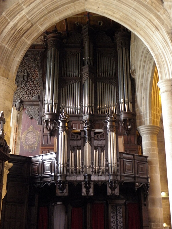 Grandes-Orgues de la basilique Notre-Dame-de-Bon-Secours de Guingamp (22).